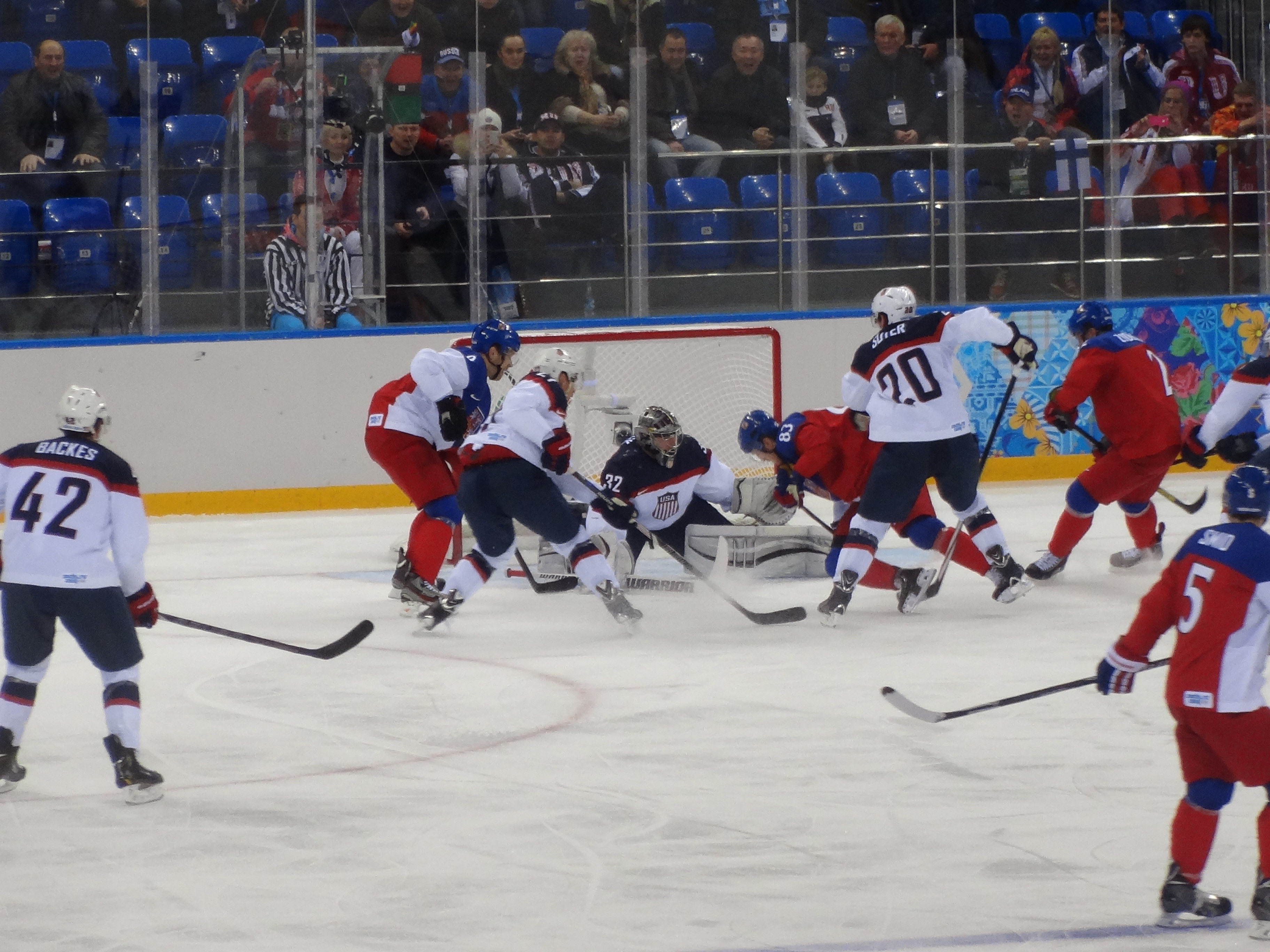 19 февраля, 21.00, «Шайба». Матч 1/4 финала олимпийского хоккейного турнира, сборная США обыграла Чехию.США – Чехия – 5:2 (3:1, 1:0, 1:1)